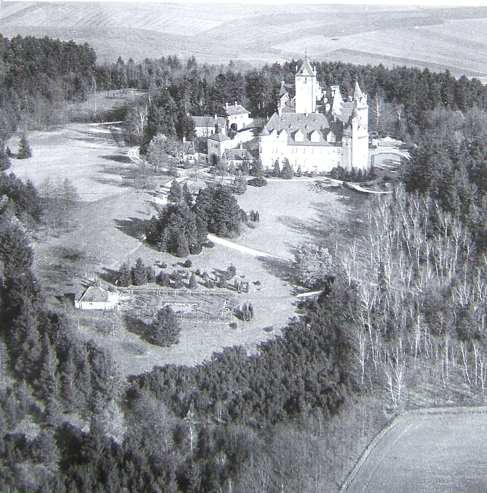 Das Bild zeigt eine Luftaufnahme des Neuen Schlosses